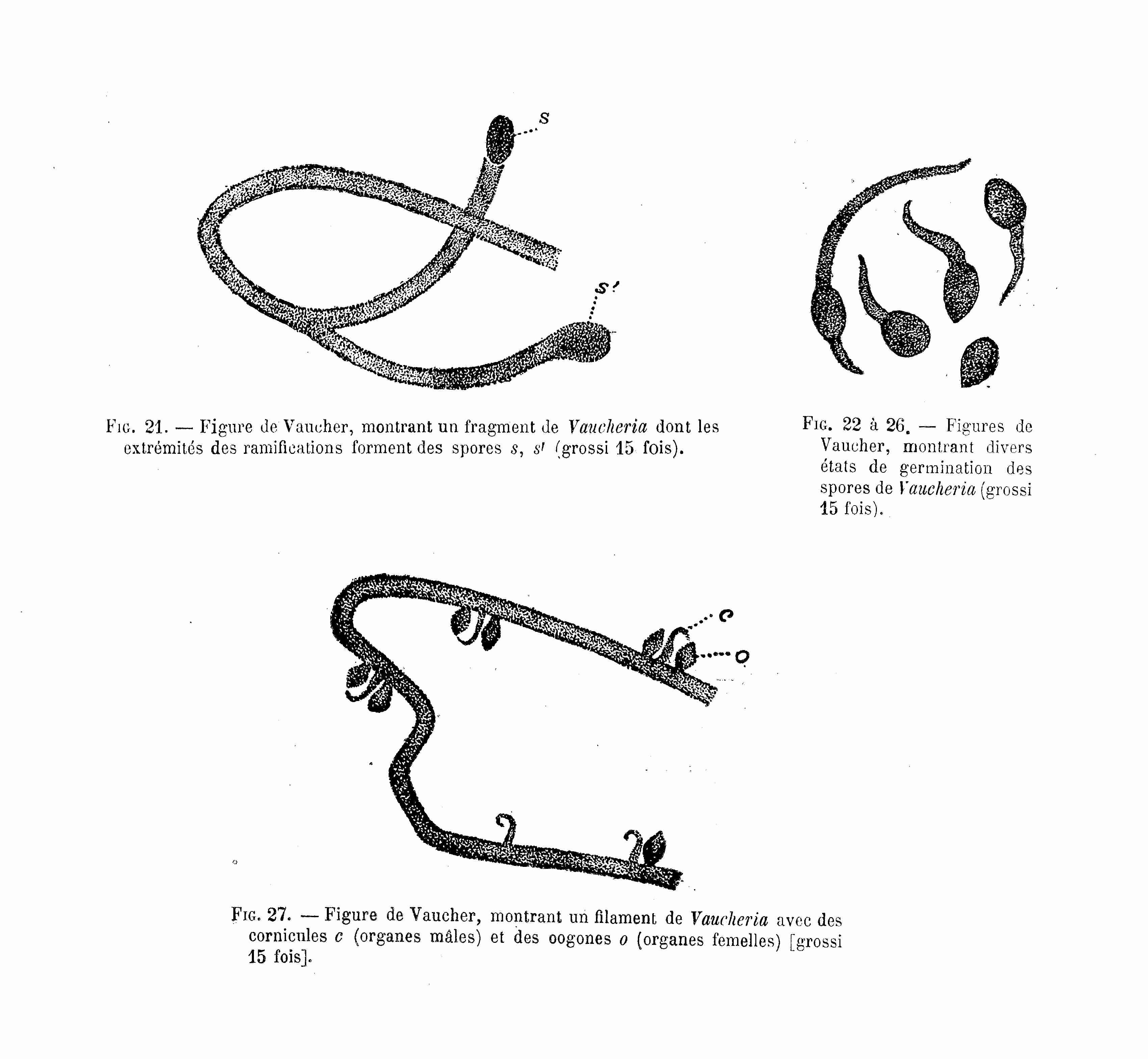 Vaucheria - filaments & spores - dessins de Vaucher